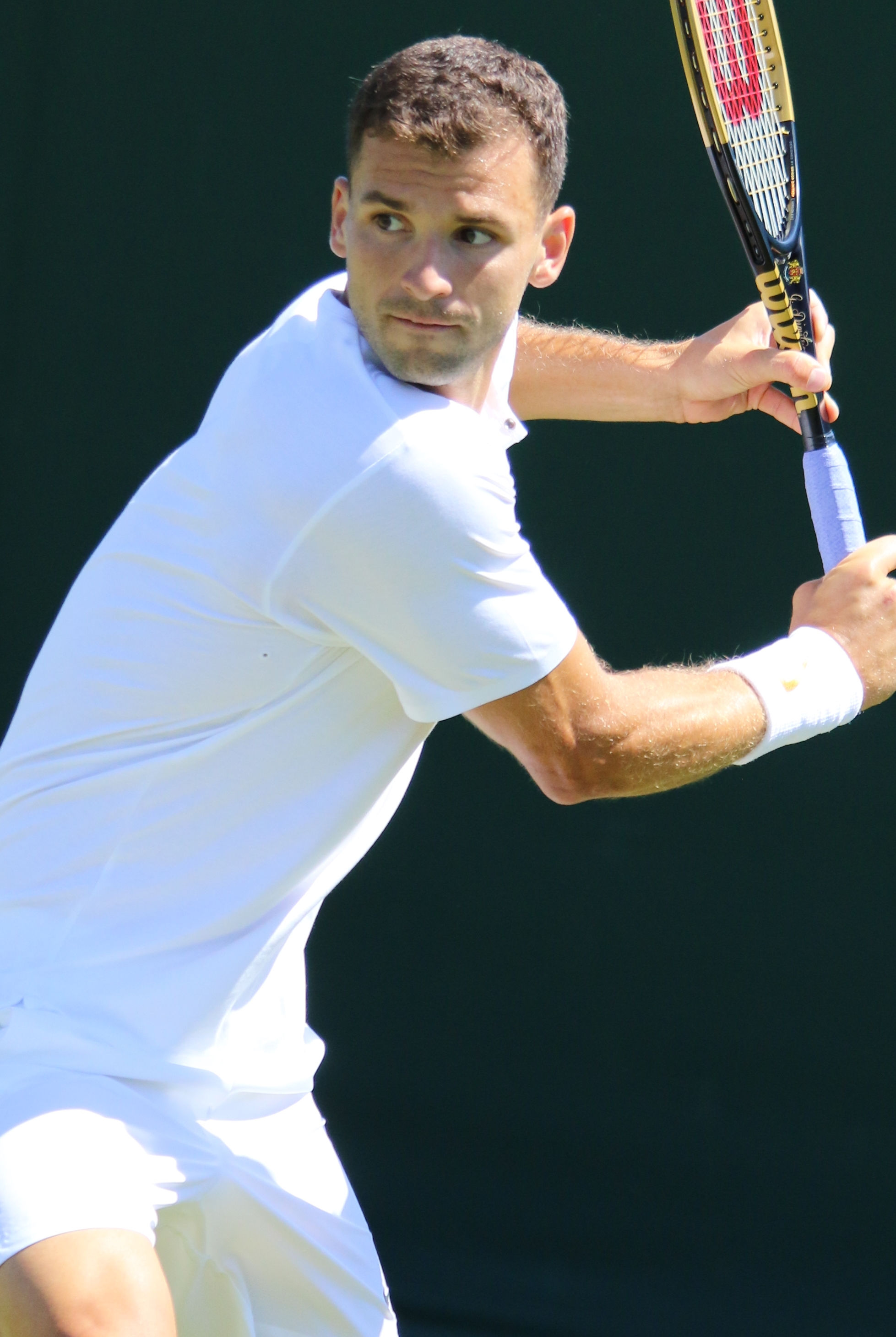 Dimitrov WM18 (121)